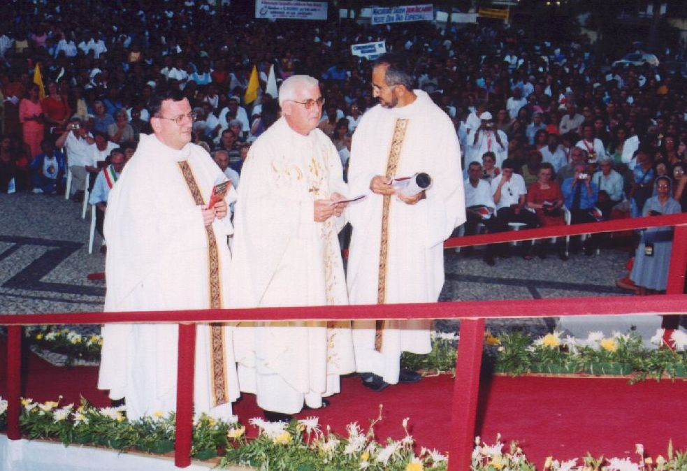 Posse do Bispo Diocesano de Caetité, Dom Riccardo Guerrino Brusati.